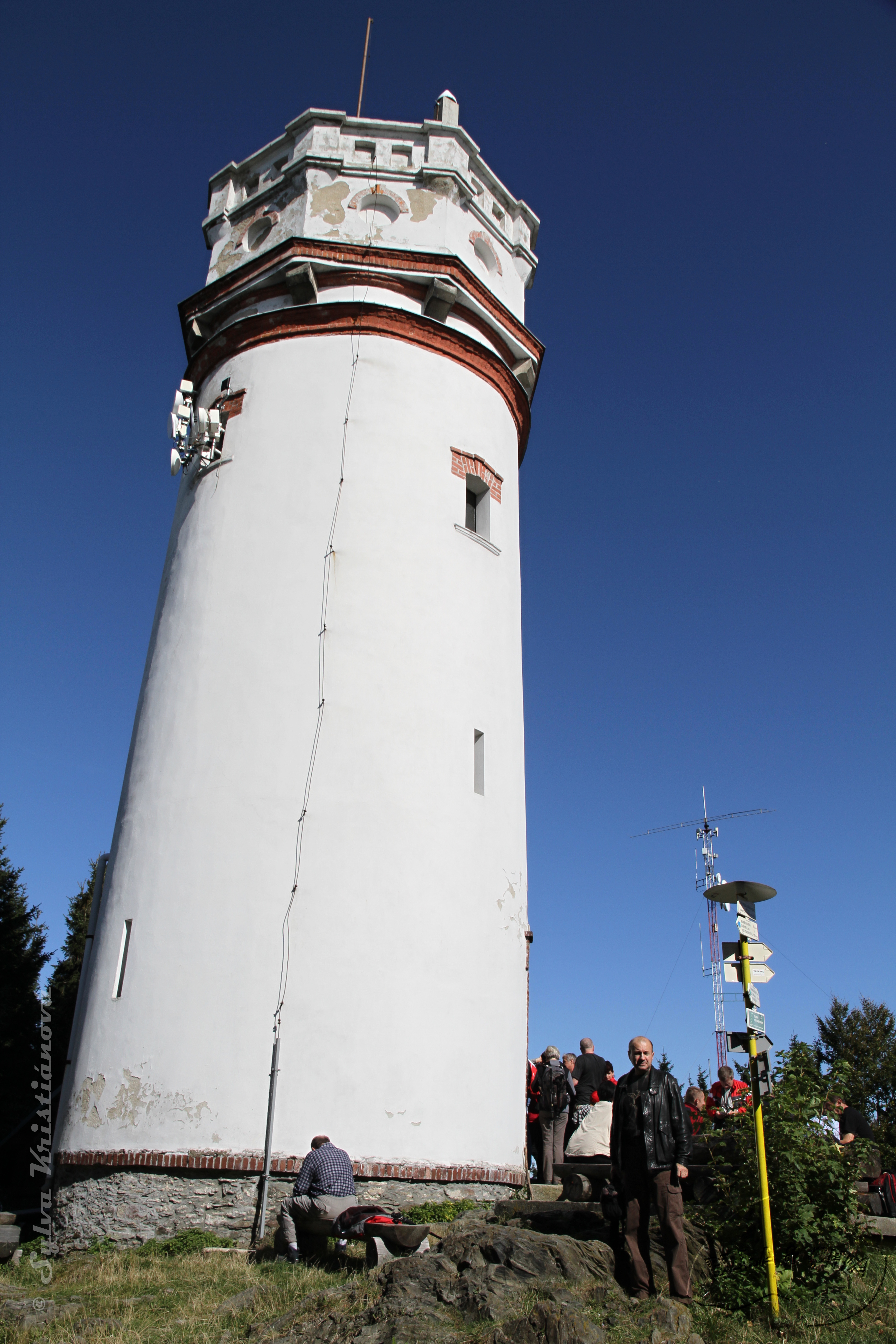 Biskupská kupa, rok 2012